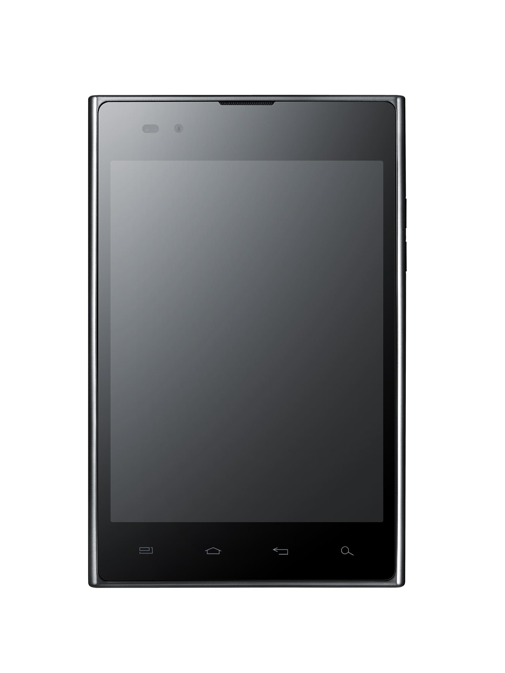 LG전자, MWC서 ‘옵티머스 Vu:(뷰)’ 전격 공개